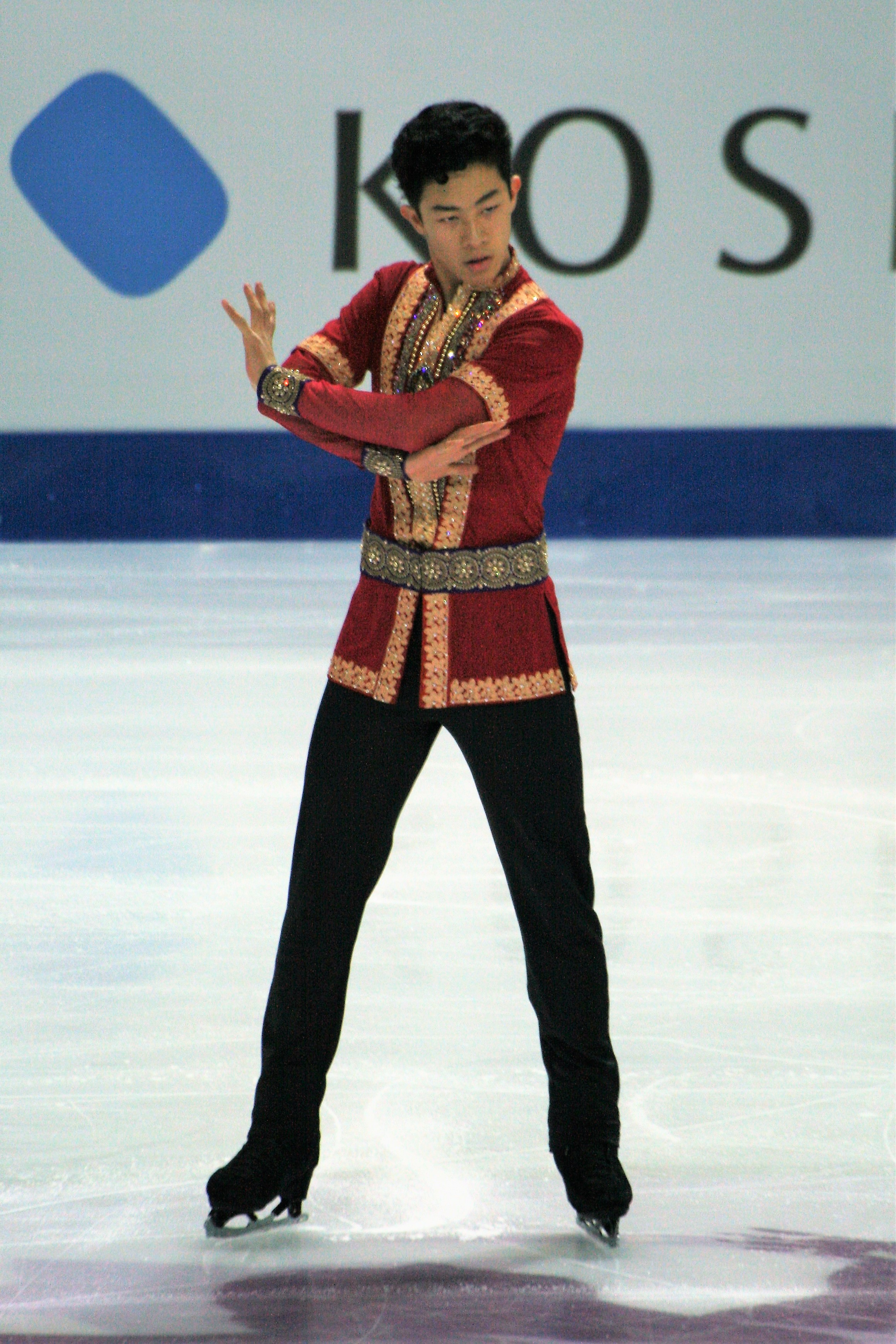 Нейтан Чен (США) на финале Гран-при по фигурному катанию 2016-2017